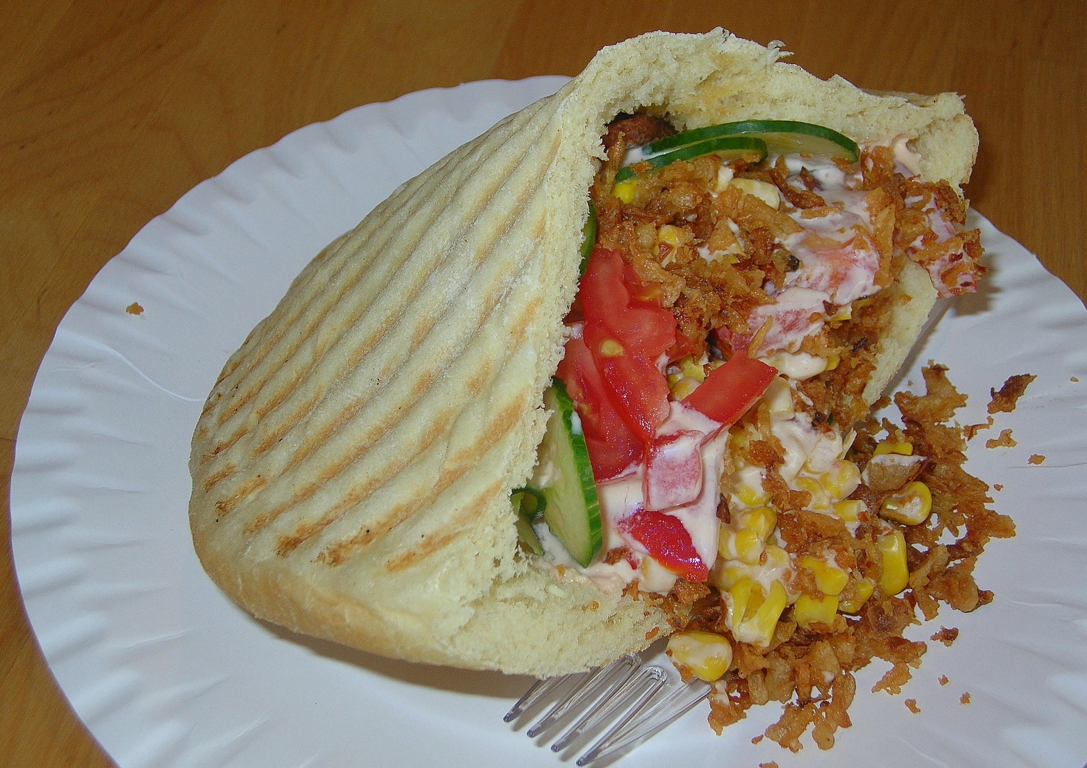 Knysza. Widoczne nadzienie warzywne, prażona cebula, fragment kotleta, sos czosnkowy. Wrocław.